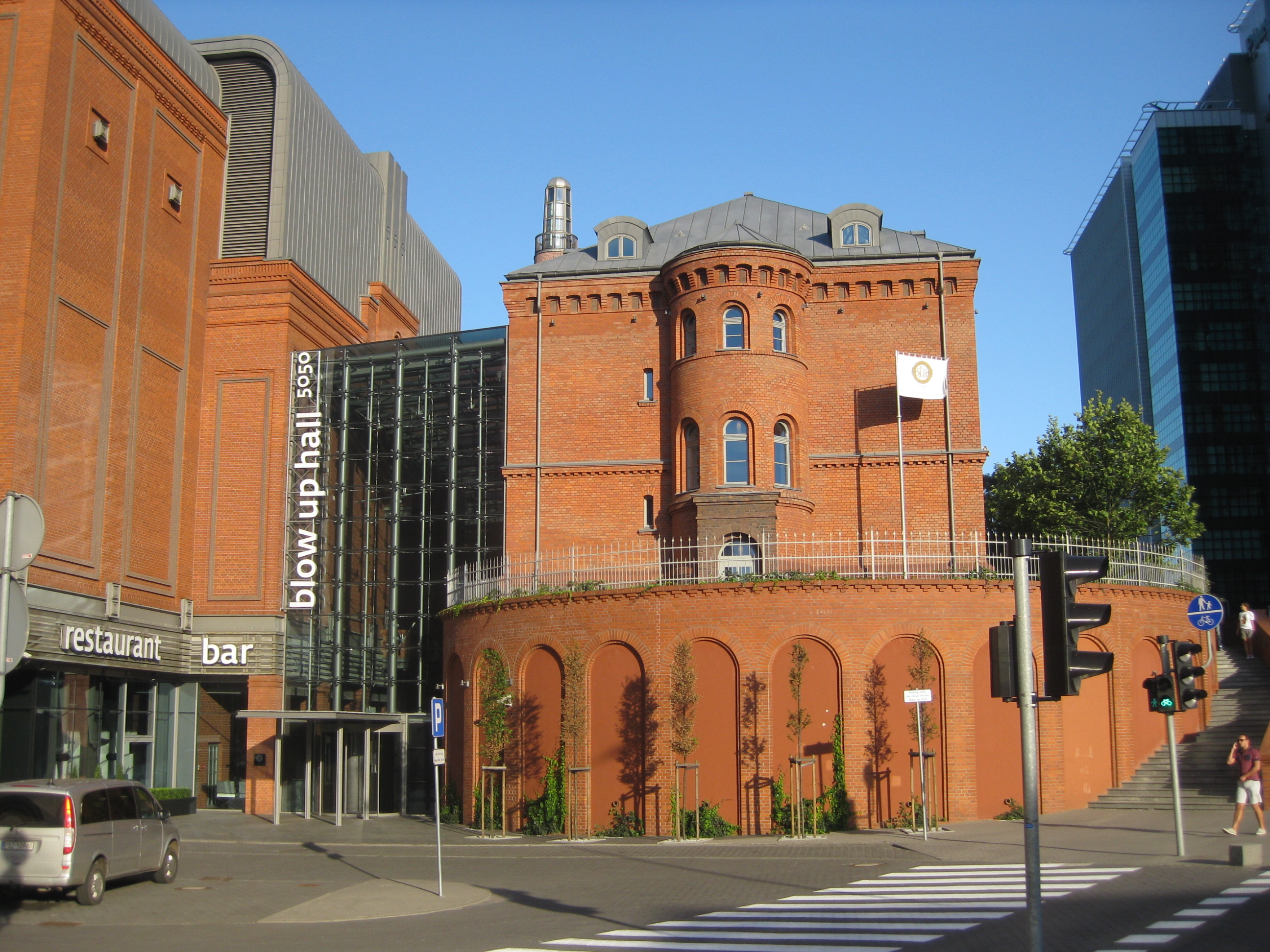 Stary Browar, Poznań, Poland